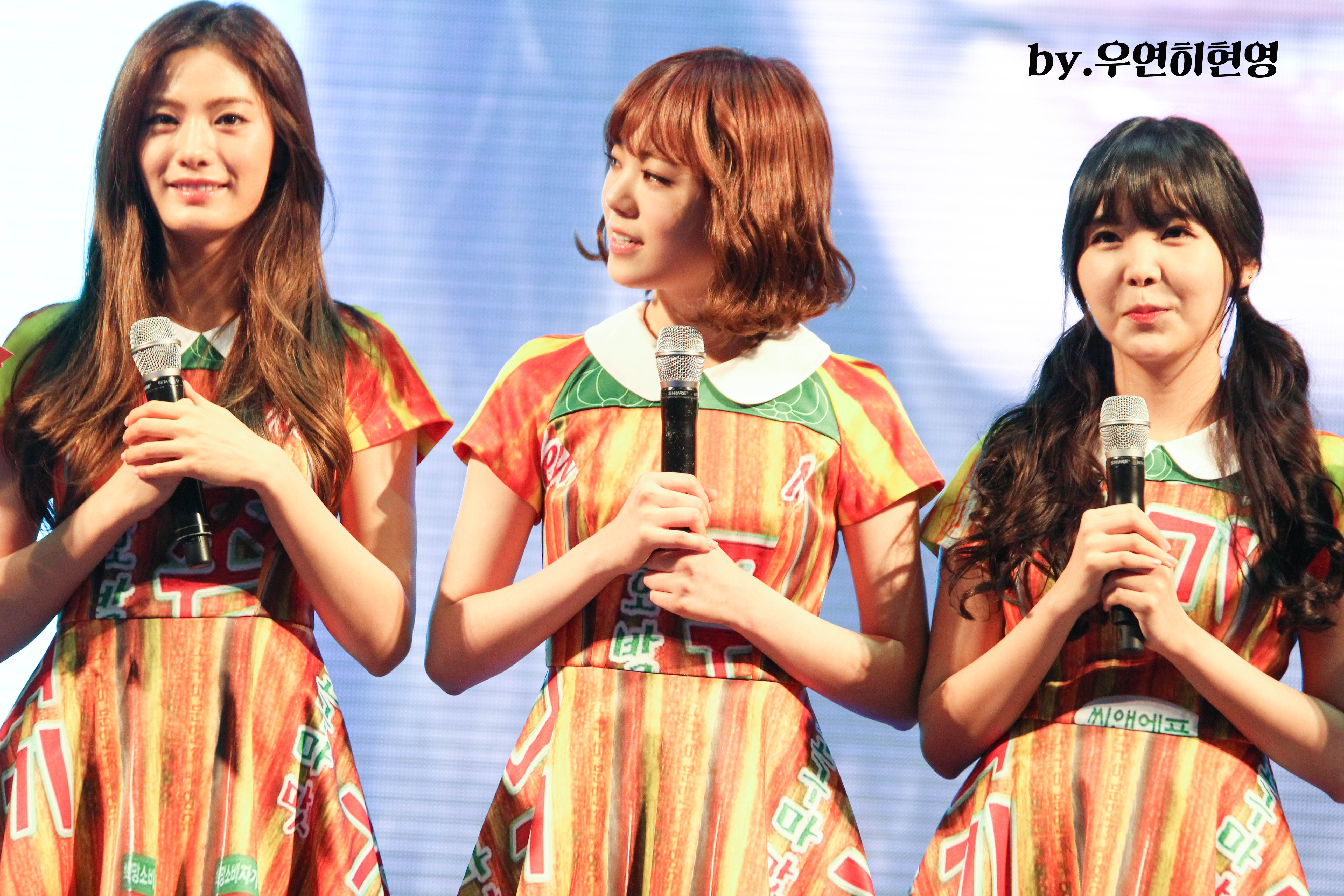 140717 오렌지캬라멜 케이윌의영스트리트 공개방송